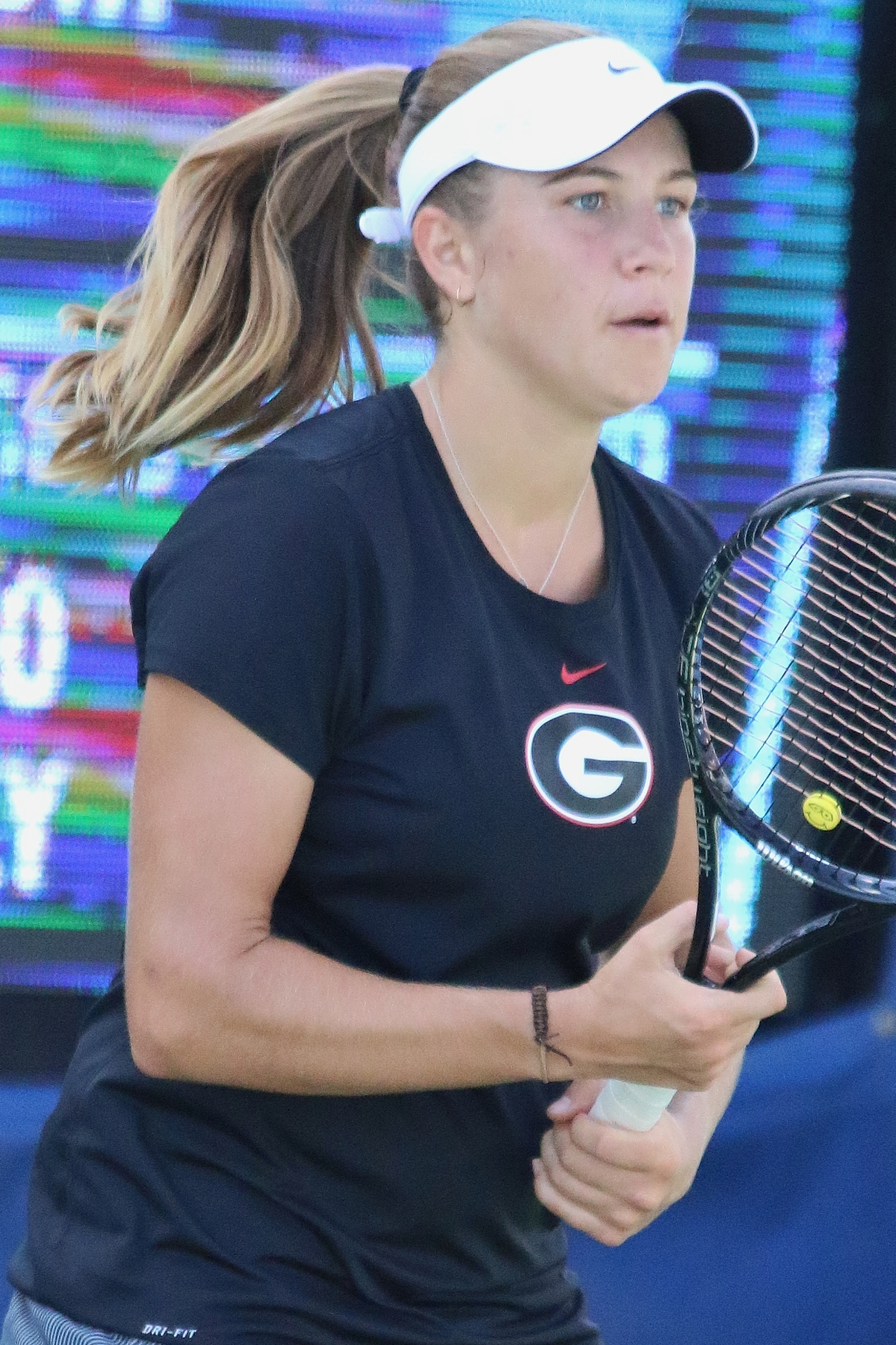 Perez US16 (7)